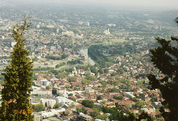 photo de la tblisi en georgie